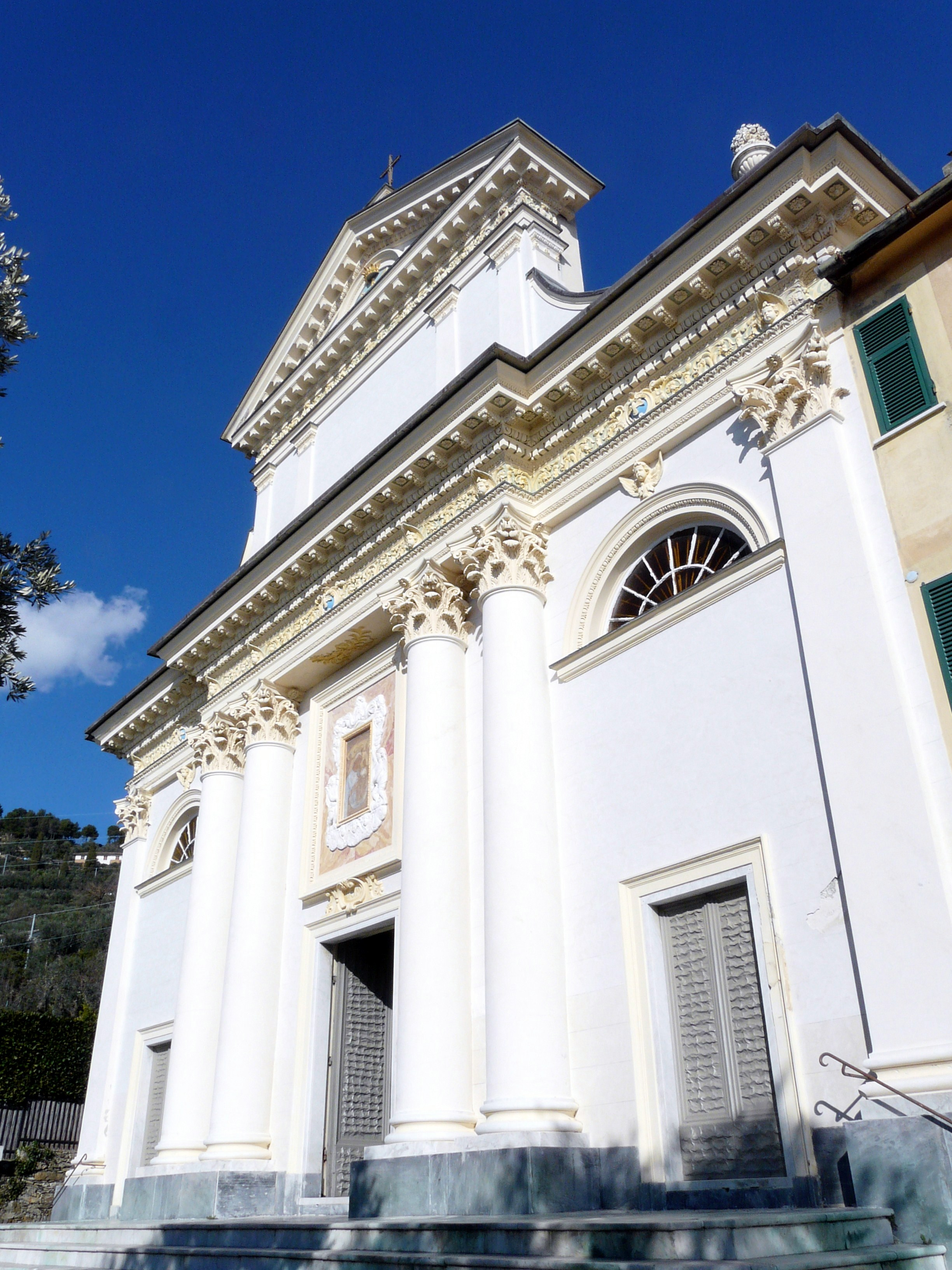 Santuario di Nostra Signora delle Grazie di Megli, Recco, Liguria, Italia